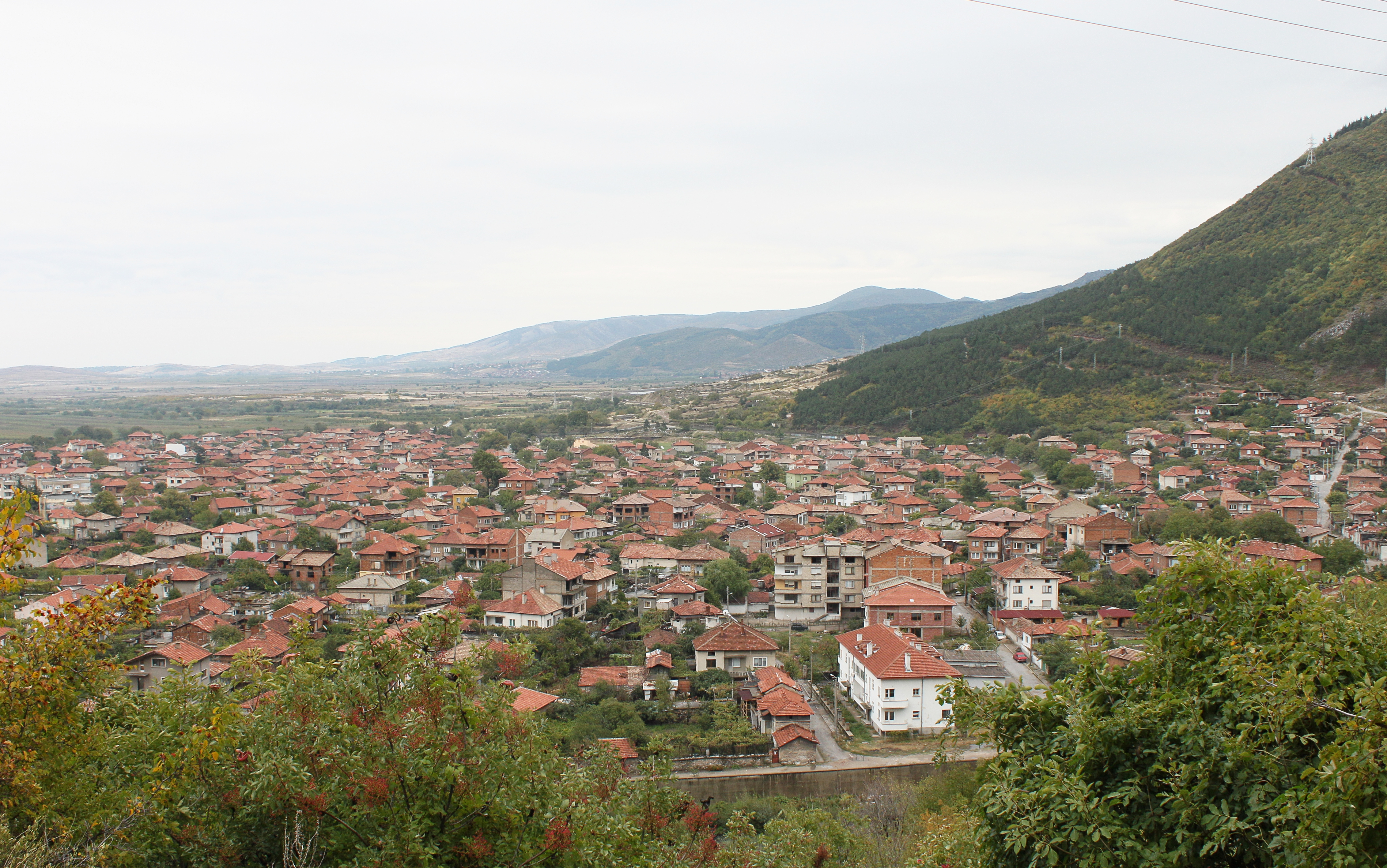 Kritschim, Bulgarien